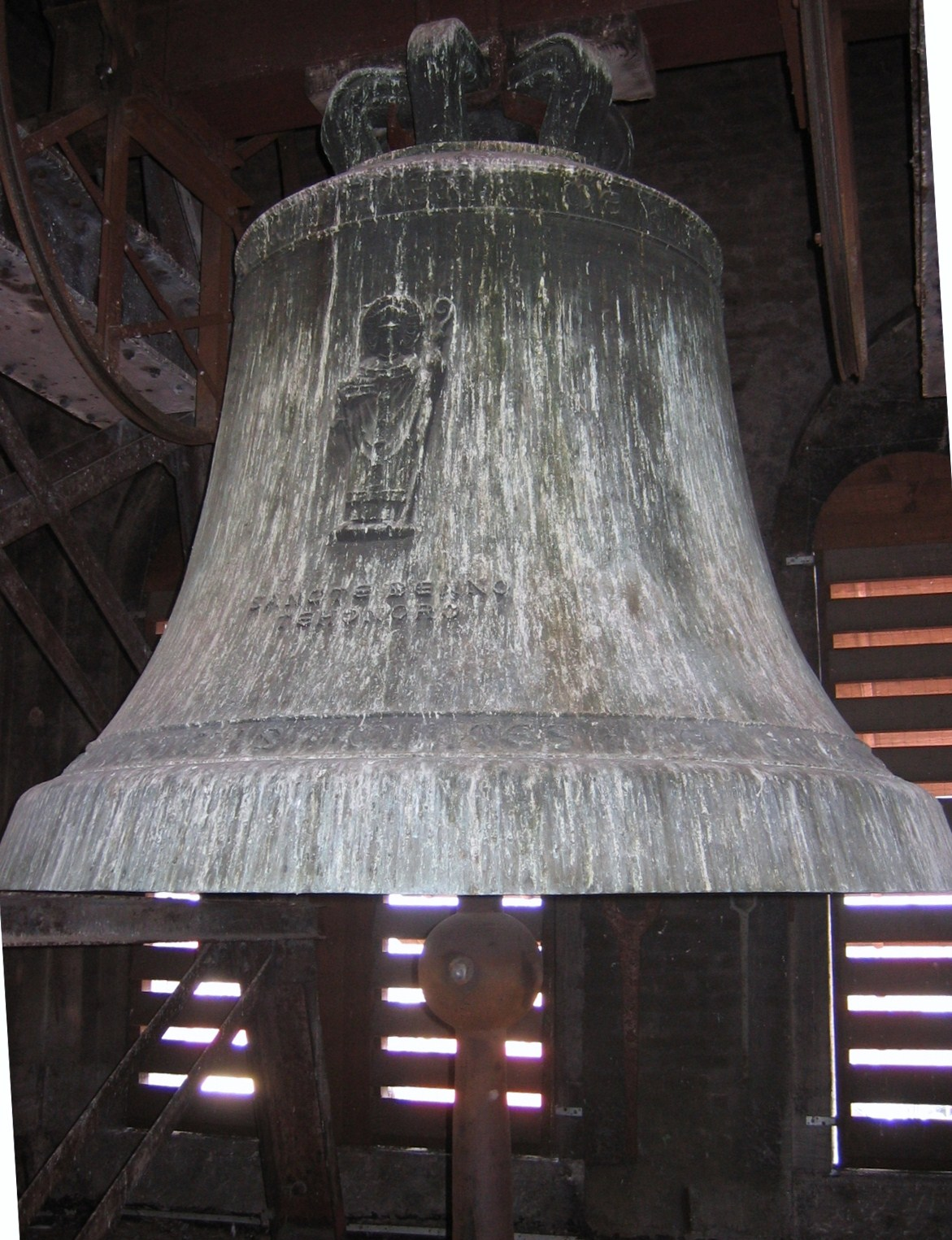 St. Benno in München-Neuhausen: Große Benno- und Marienglocke (ges0)